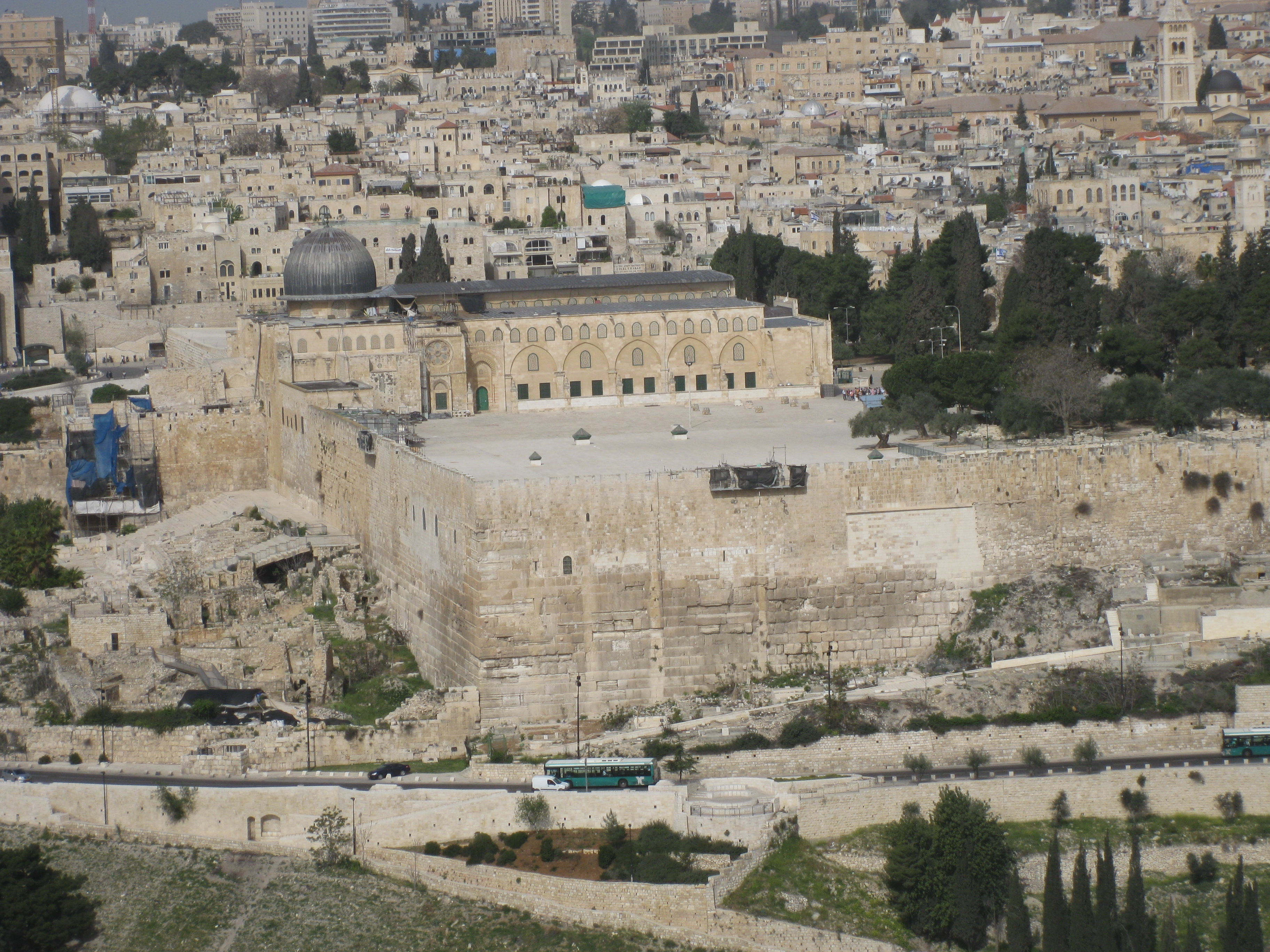 Mount Olives הר הזיתים